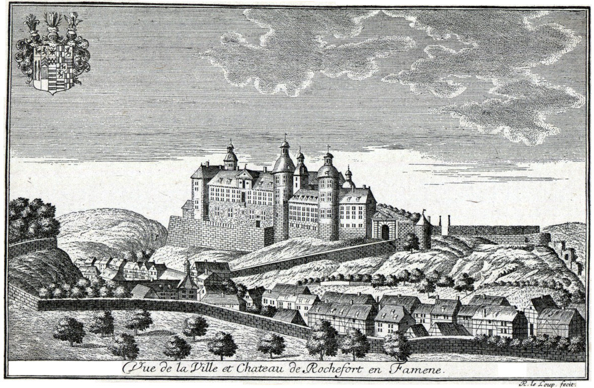 Stich mit der Abbildung des Orts und Schlosses Rochefort in Belgien